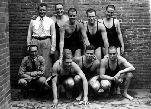 Waterpolo, Nederlands Zevental 1936. Hans Stam, Hans Maier (in front, 2nd to right), Soesoe van Oostrom Soede, Frans Kuyper (coach), Lex Franken, Kees van Aelst, Jan van Heteren, Rudie den Hamer, Herman Veenstra, Gerard Regter, Joop van Woerkom.